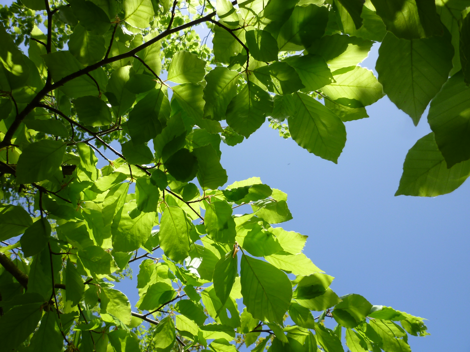 Frisches Laub an den Buchen im Sagwassertal im Nationalpark Bayerischer Wald. Das Sagwassertal ist eine Aufstiegsroute zum 1.373 m hohen Lusen-Gipfel ab der Sagwassersäge.